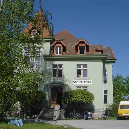 Centre Fries, Studierendenzentrum der Universität Fribourg (CH)